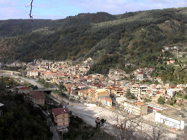 L'abitato di San Roberto